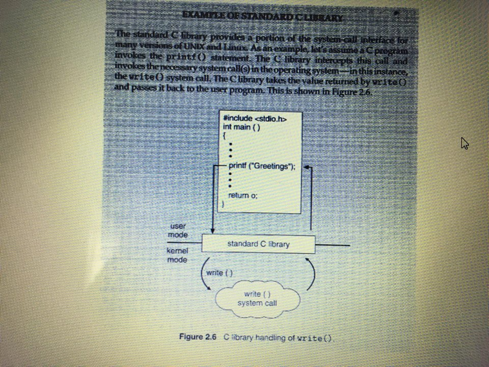 Монгол: Стандарт C хэлний аппликейшн програмчлалын интерфейс